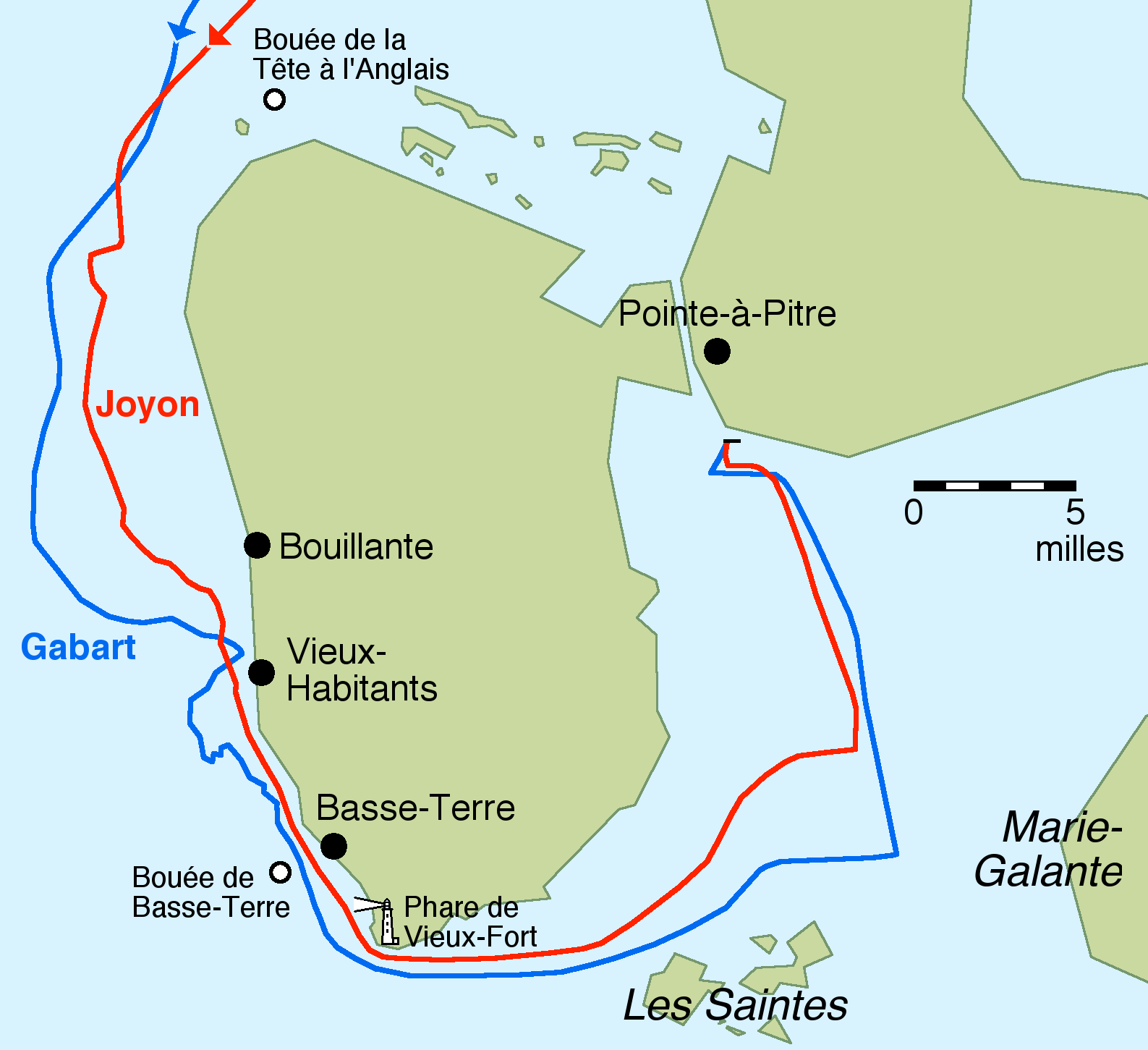 Arrivée à la Guadeloupe de Francis Joyon et François Gabart, 1er et 2e de la catégorie Ultime, dans la Route du Rhum 2018. Sources : tracé des côtes (très schématisé) d'après le fichier Commons Map Guadeloupe Be.png de Frantishak ; trajectoires des concurrents (très approximatives) d'après la cartographie georacing du site officiel de la course .